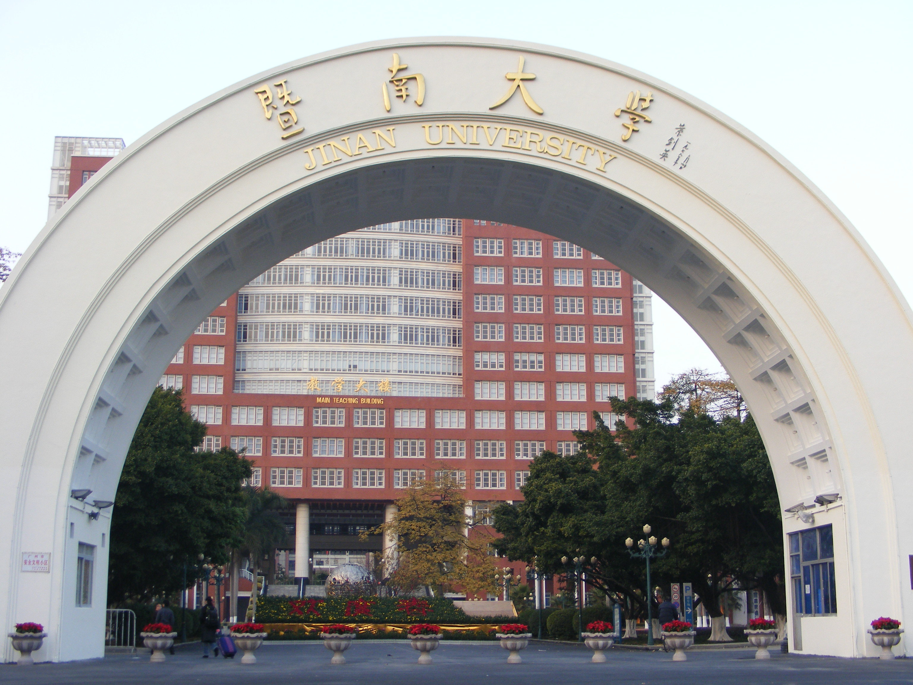 暨南大学南门